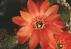 Rebutia tarvitaensis aus der Sammlung von „Andreae Kakteenkulturen“, Inh. Michael Januschkowetz, Ausserhalb Lengfeld 17, 64853 Otzberg-Lengfeld